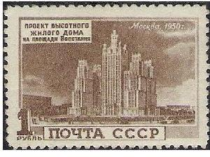 Почтовая марка СССР № 1583. Проект высотки на площади Восстания